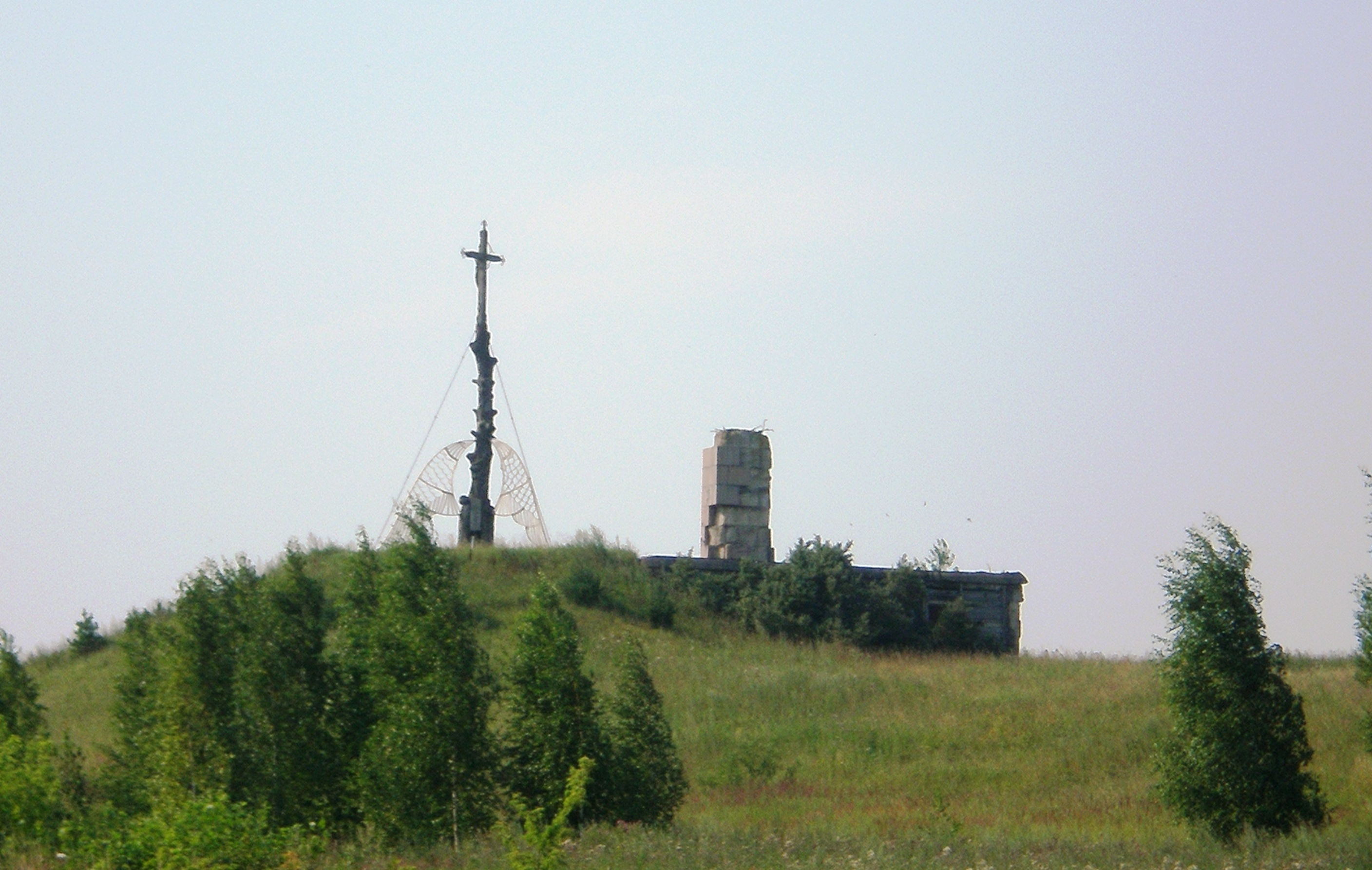 Kryžkalnis, Raseinių rajonas